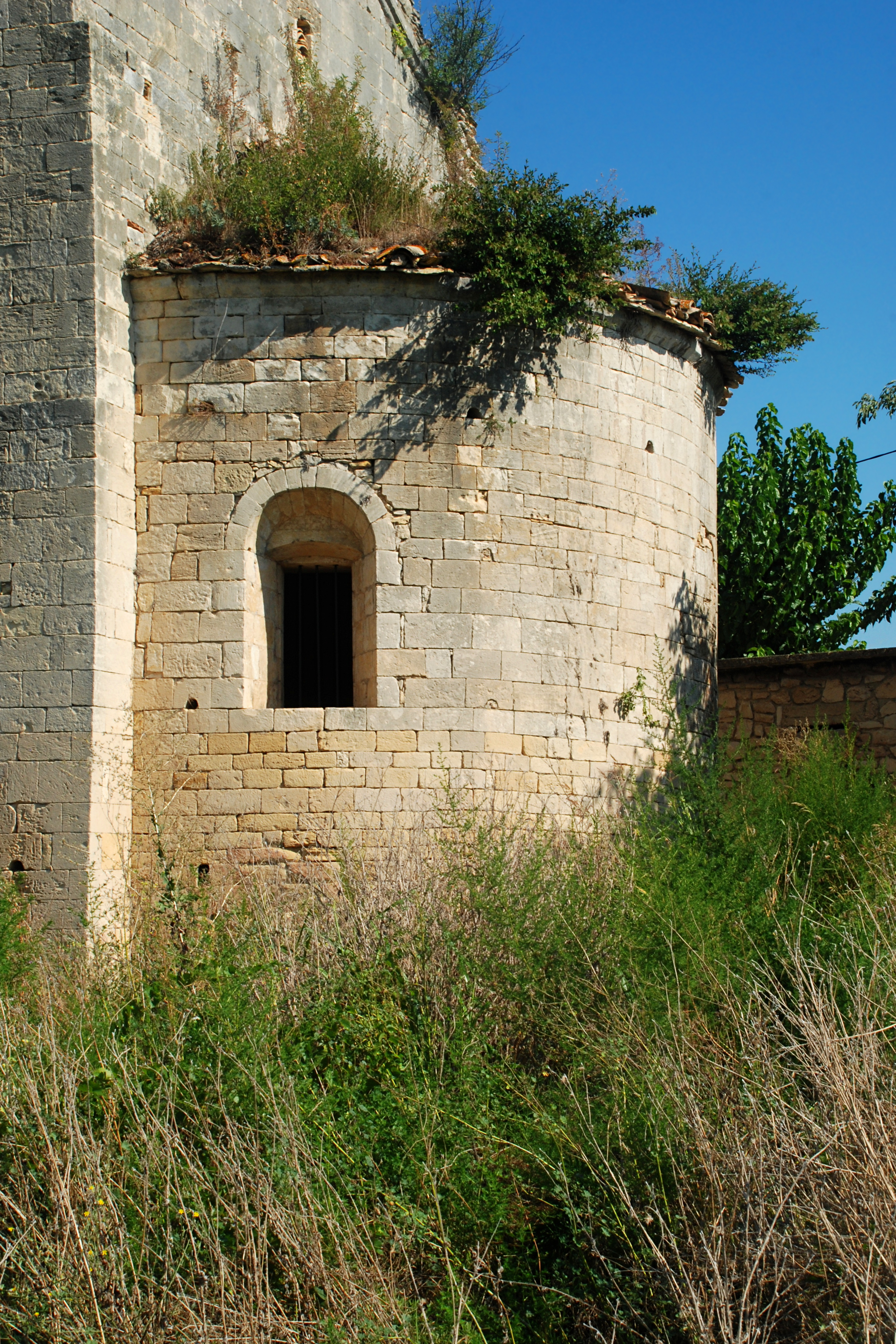 France - Gard - Bagnols-sur-Cèze - Chapelle Saint-Thyrse de Maransan